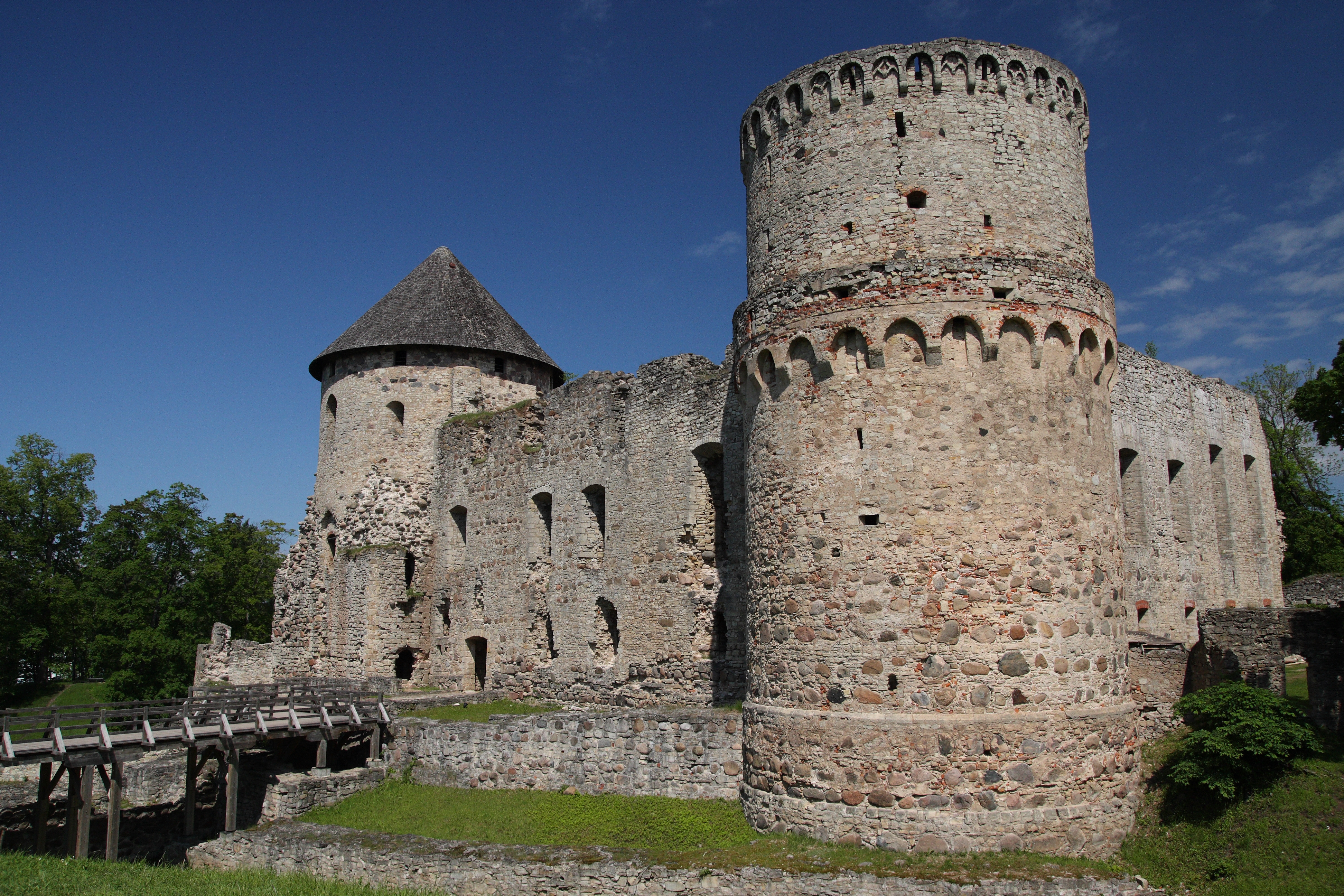 Cesis, Latvia